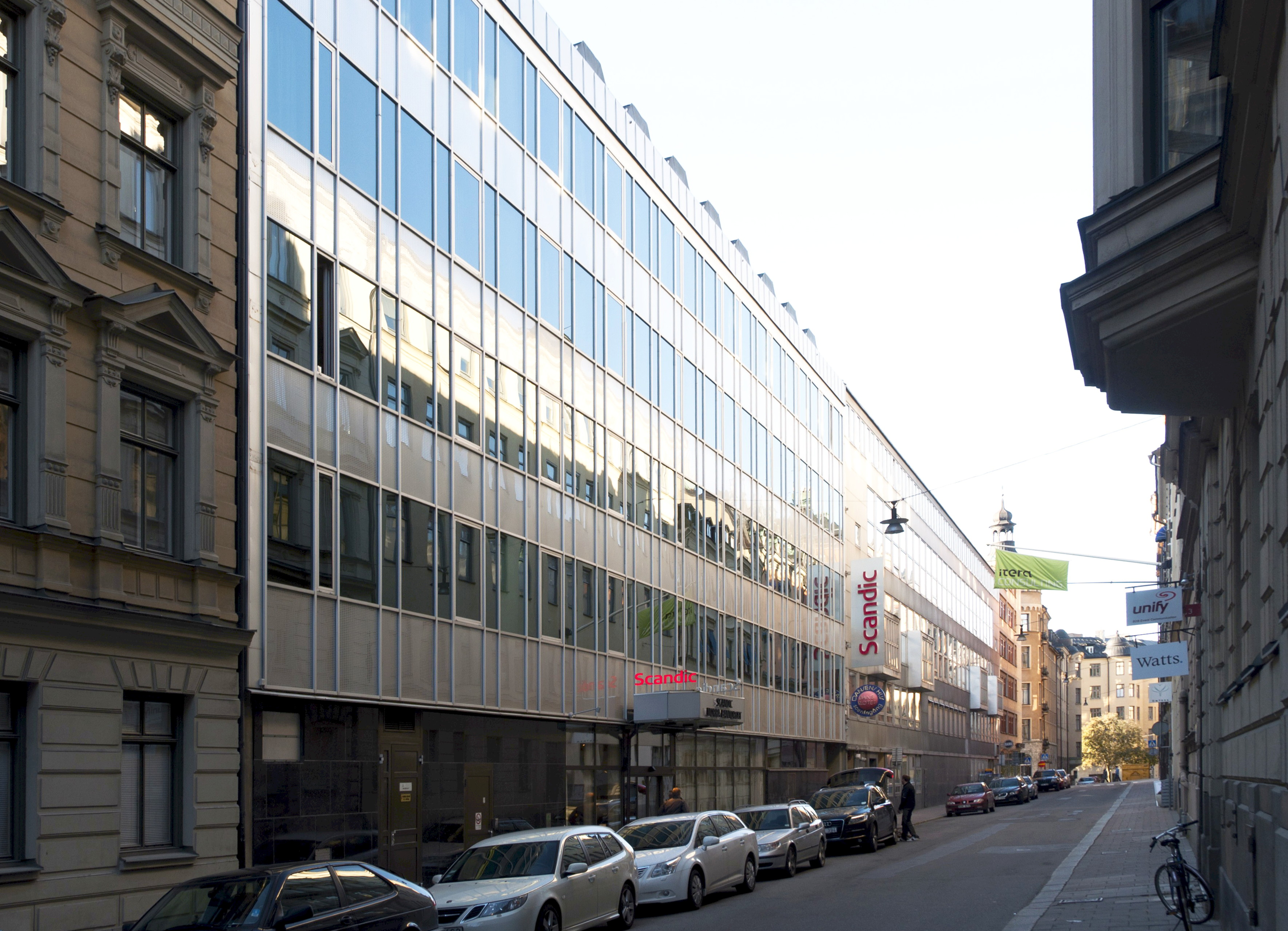 Wallingatan 15, Scandic Norra Bantorget. Byggnadsår (Wallingatan 15, 17) 1953-55; arkitekt: Sven Markelius; byggherre Folkets Hus i Stockholm, byggmastare BPA